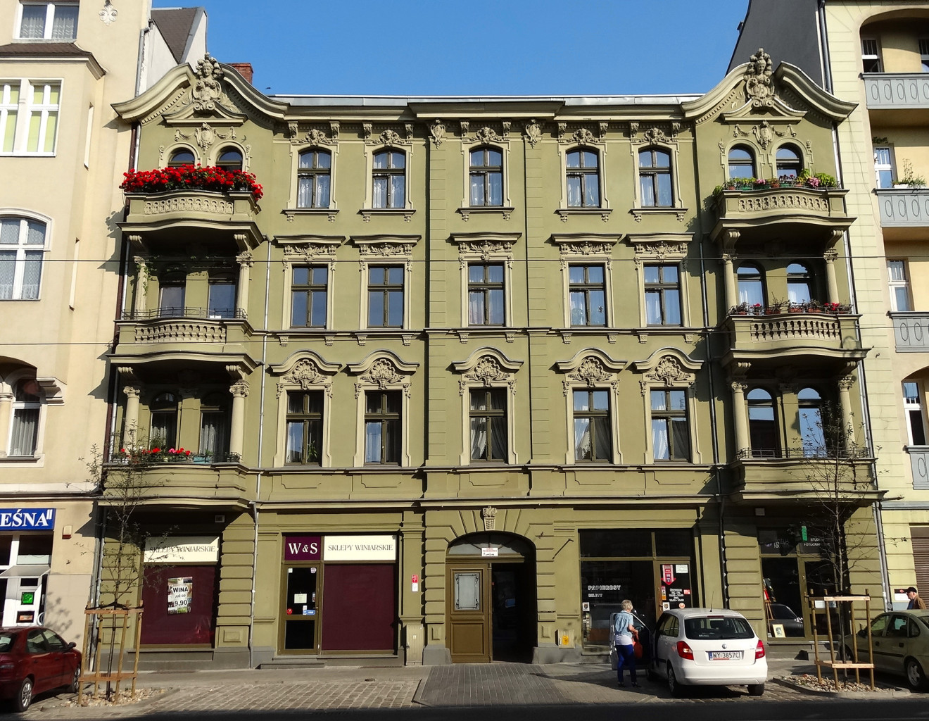 Kamienica przy ul. Gdańskiej 93 w Bydgoszczy (1895-1897, aut. Józef Święcicki)